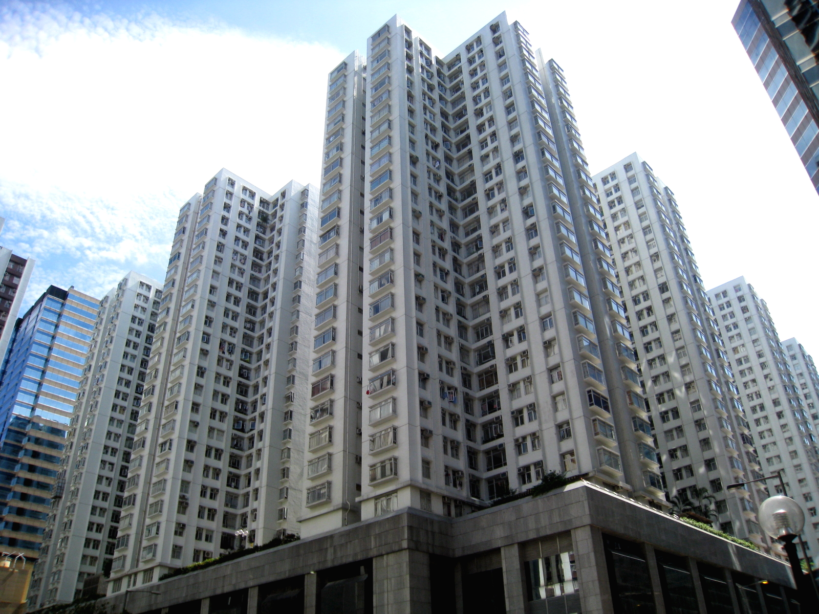 HK Tai Koo Shing Horizon Gardens 太古城 海天花園